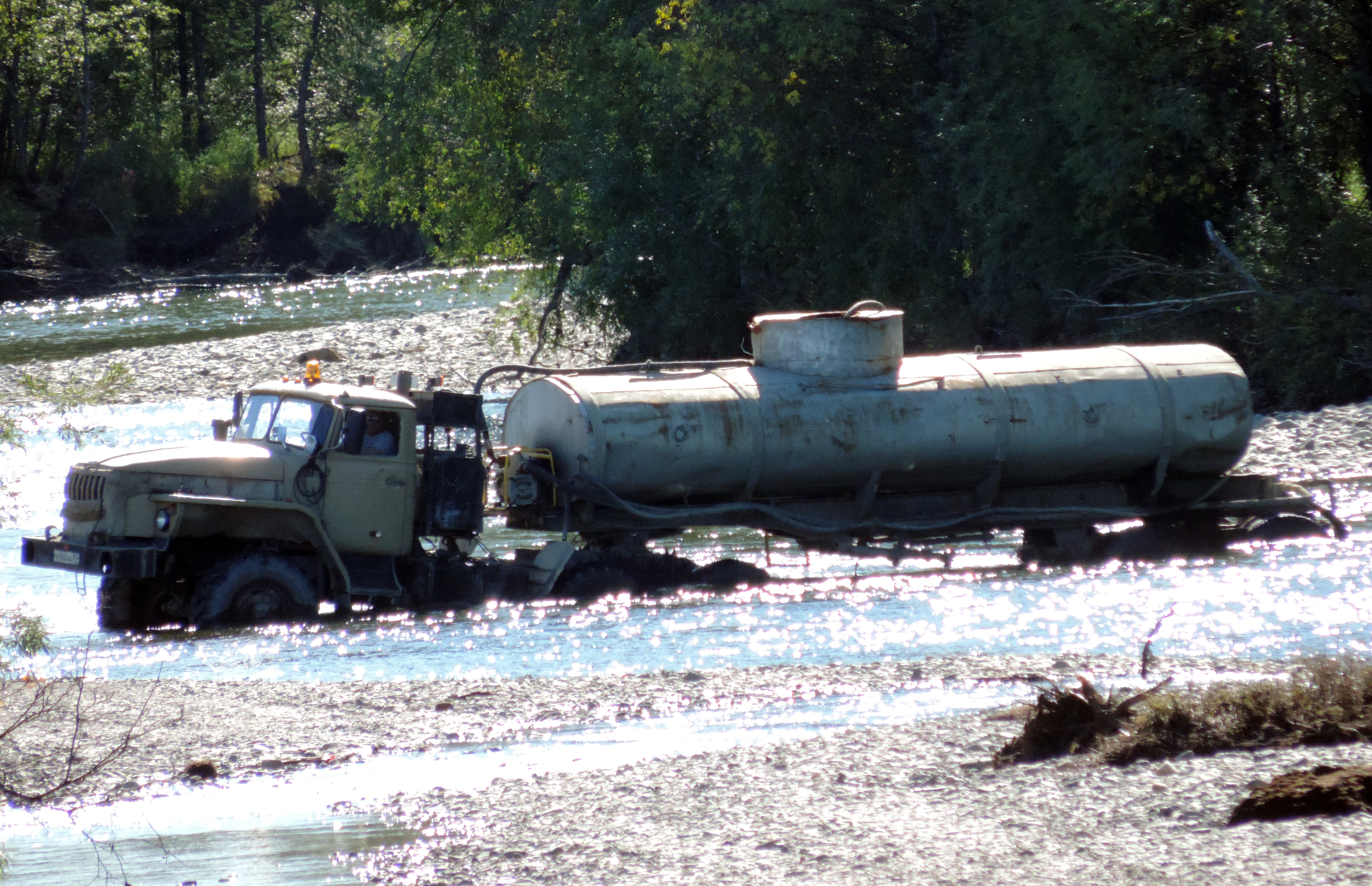 Bilibinsky District, Chukotka Autonomous Okrug, Russia